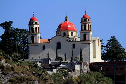 Iglesia El Calvario de Aljojuca Puebla México